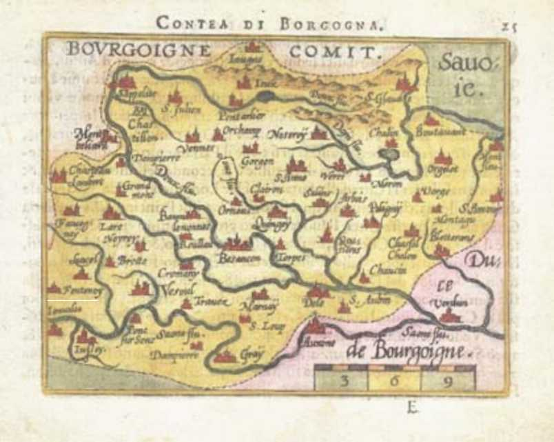 Carte de Burgundia, Bourgogne.